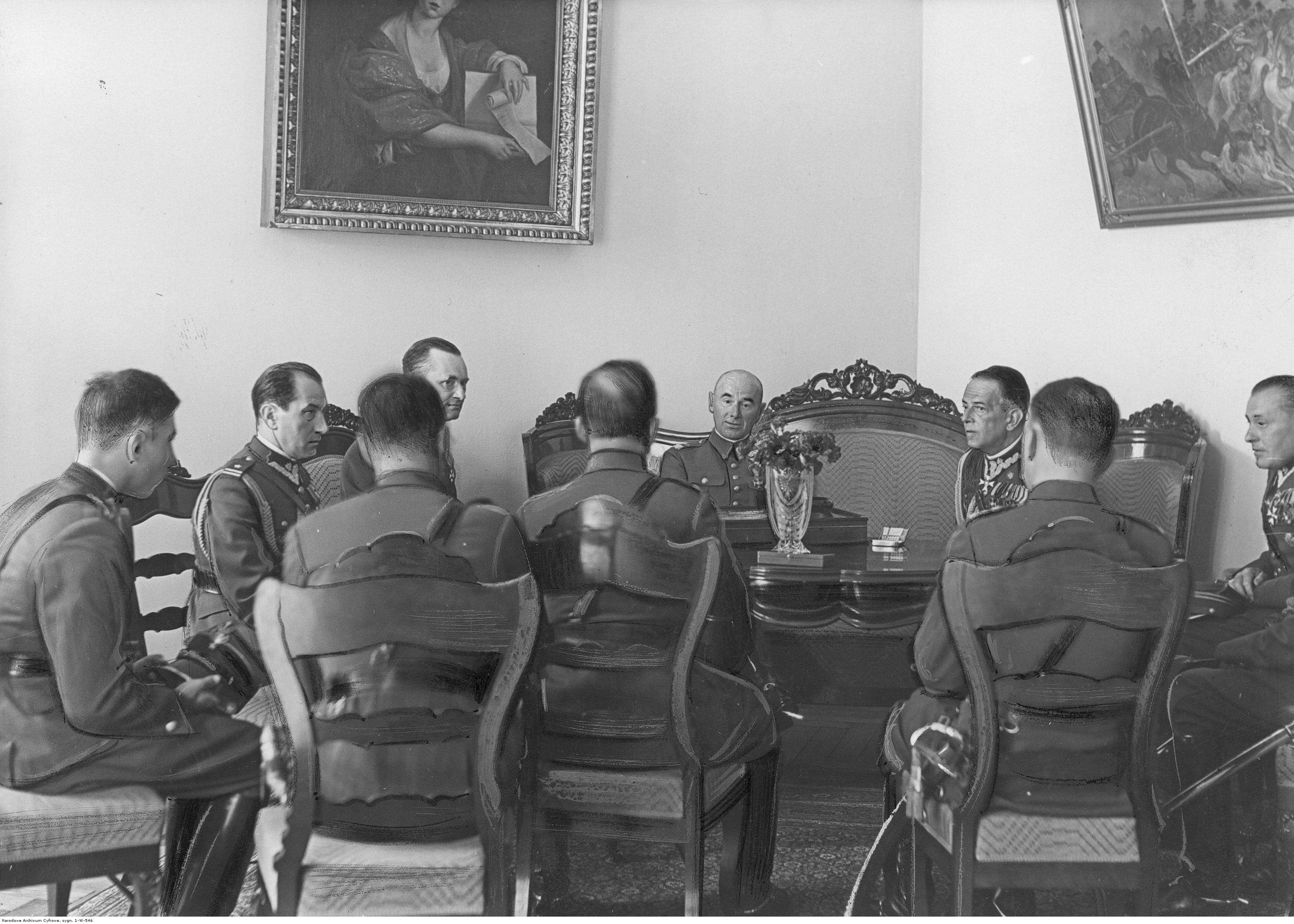 Wizyta delegacji 7 Dywizji Piechoty u marszałka Edwarda Śmigłego-Rydza. Delegacja oficerów 7 DP wręczyła marszałkowi odznaki pułków wchodzących w skład tej dywizji. Widoczni członkowie delegacji, z dowódcą gen. bryg. Januszem Tadeuszem Gąsiorowskim (na kanapie, obok marszałka). Koncern Ilustrowany Kurier Codzienny - Archiwum Ilustracji. Sygnatura: 1-W-546